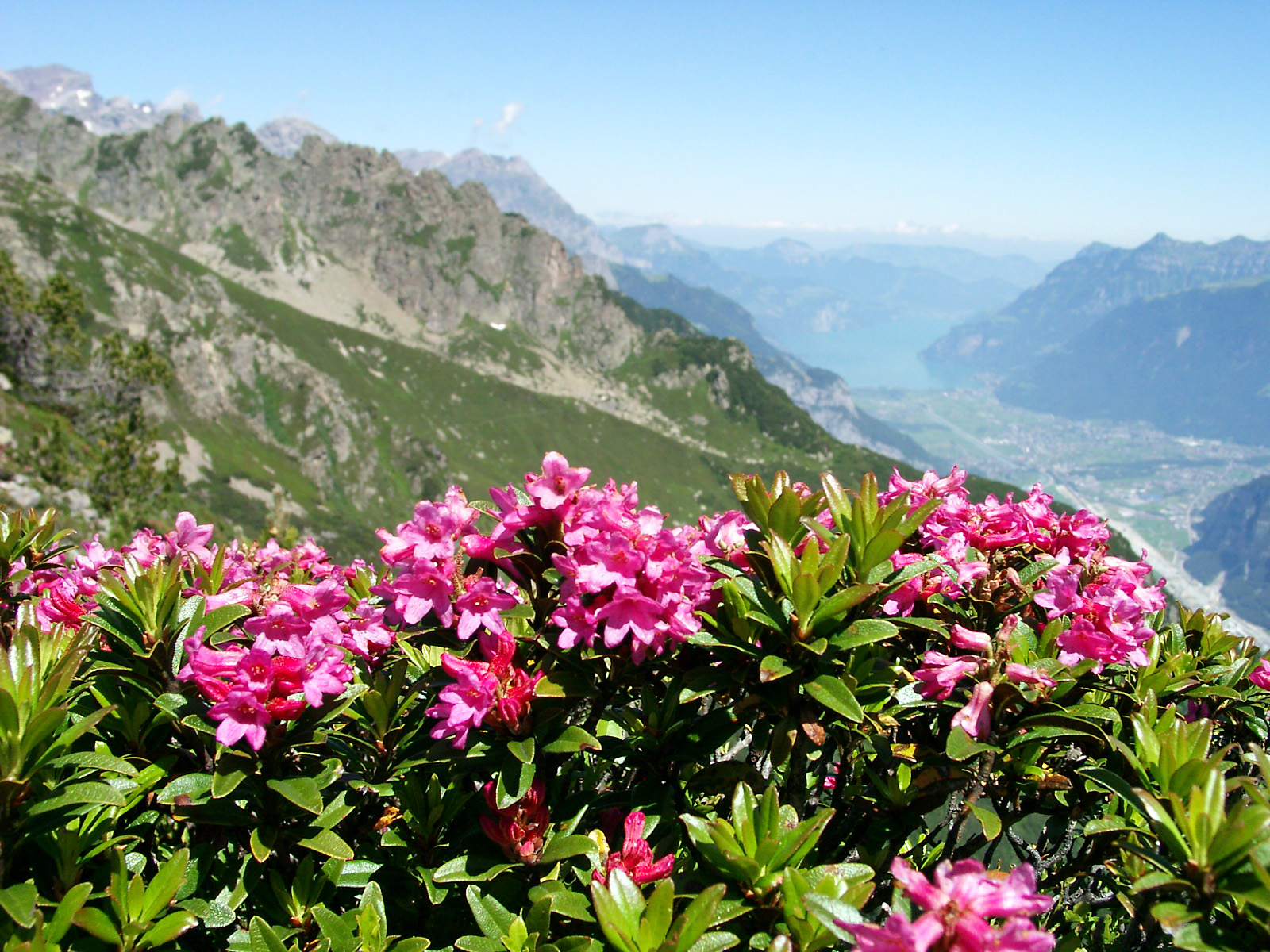 Alpenrosen auf dem Sunniggrätli. Das Sunniggrätli ist ein hervorragender Aussichtspunkt ins Reusstal und auf die Urner Alpen.